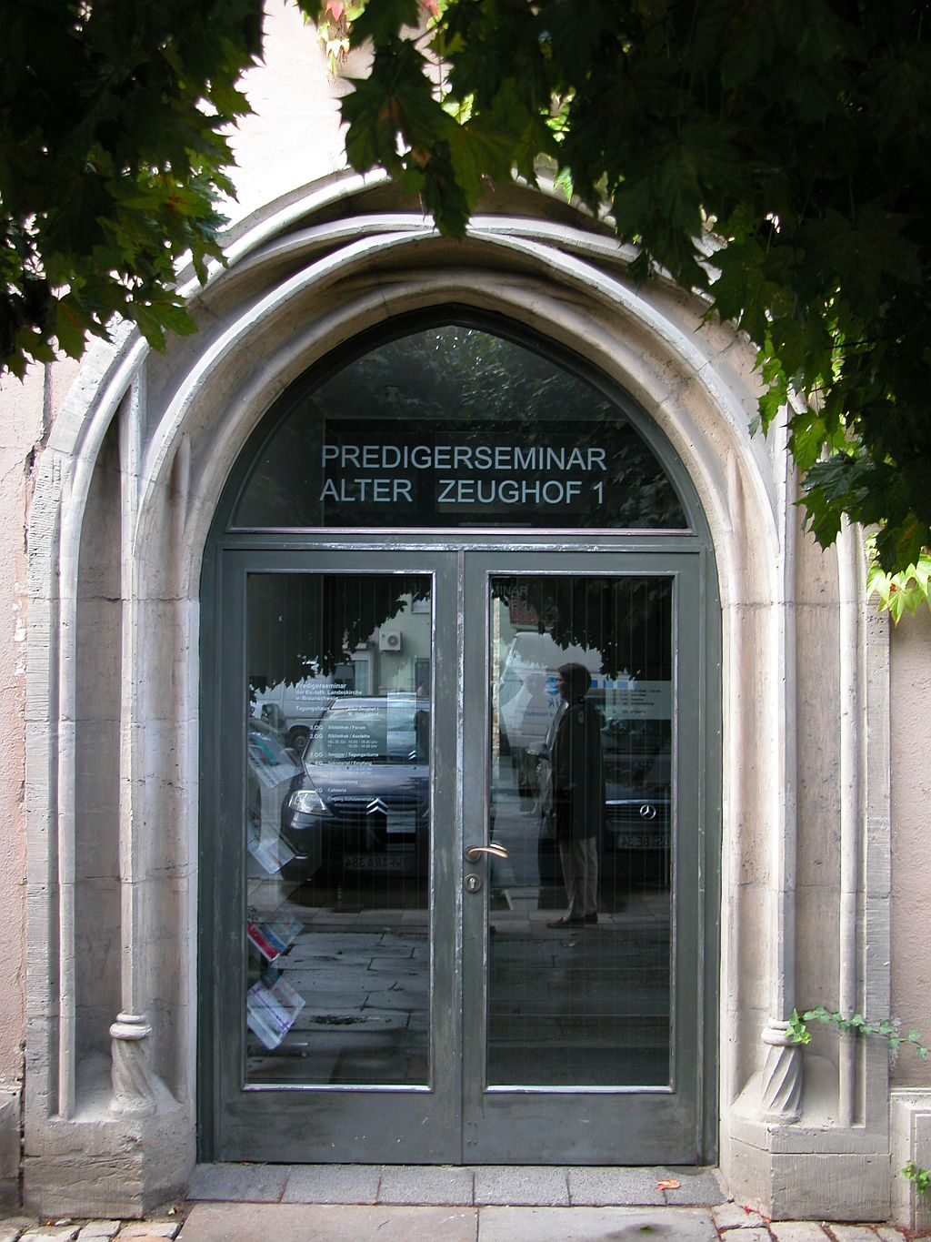 Portal der ehemaligen Maria-Magdalenen-Kapelle, seit 1955 Alter Zeughof 1, in Braunschweig.